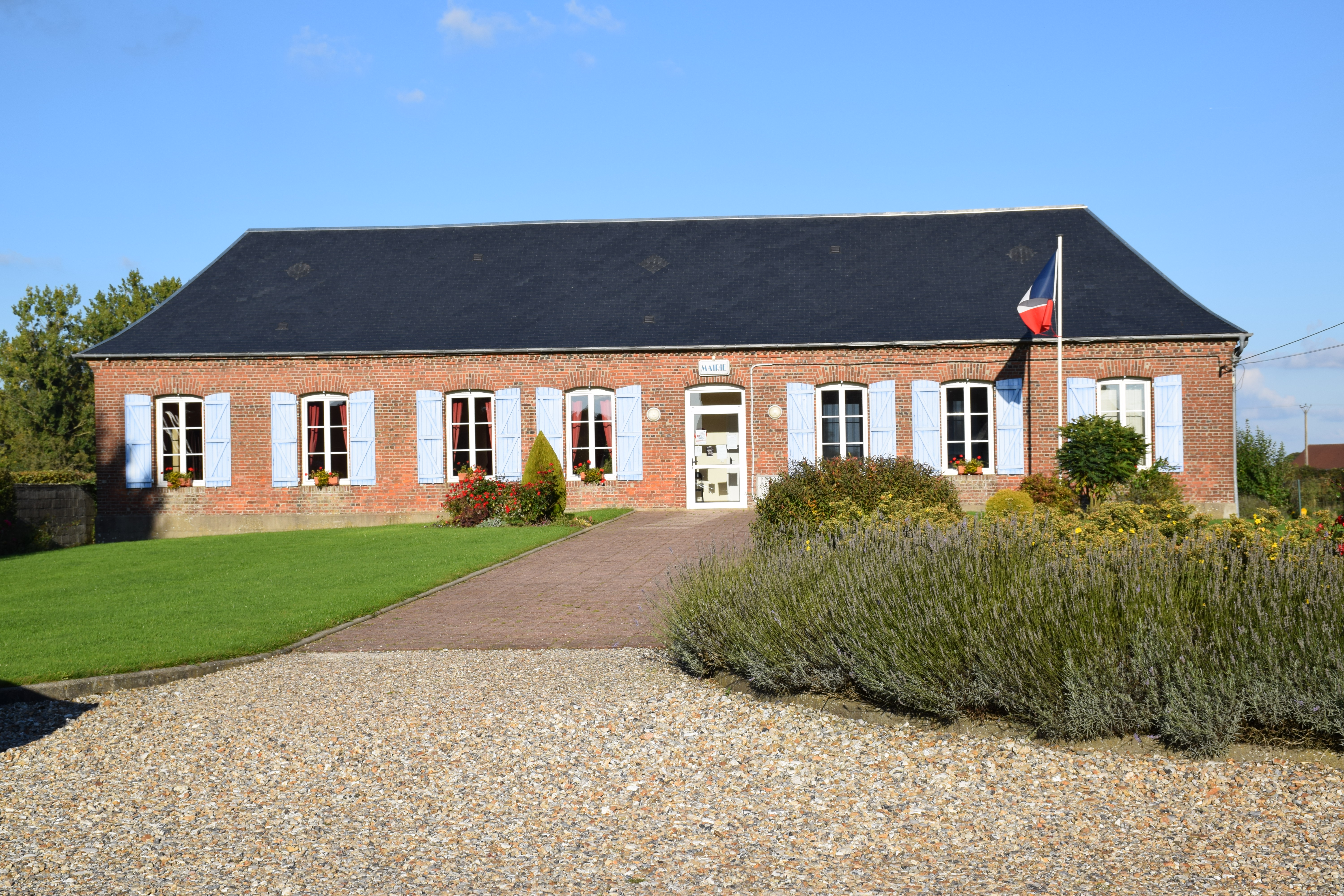 Mairie